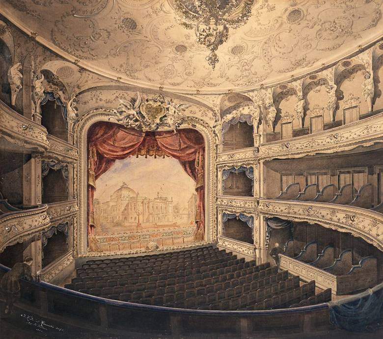 Lessingtheater Berlin, Innenansicht, als Kulisse eine Außenansicht des Theaters; Aquarell, Deckweiß und Feder, 1888; von Hans Krause (* 1864; † unknown, fl. –1918 (?))